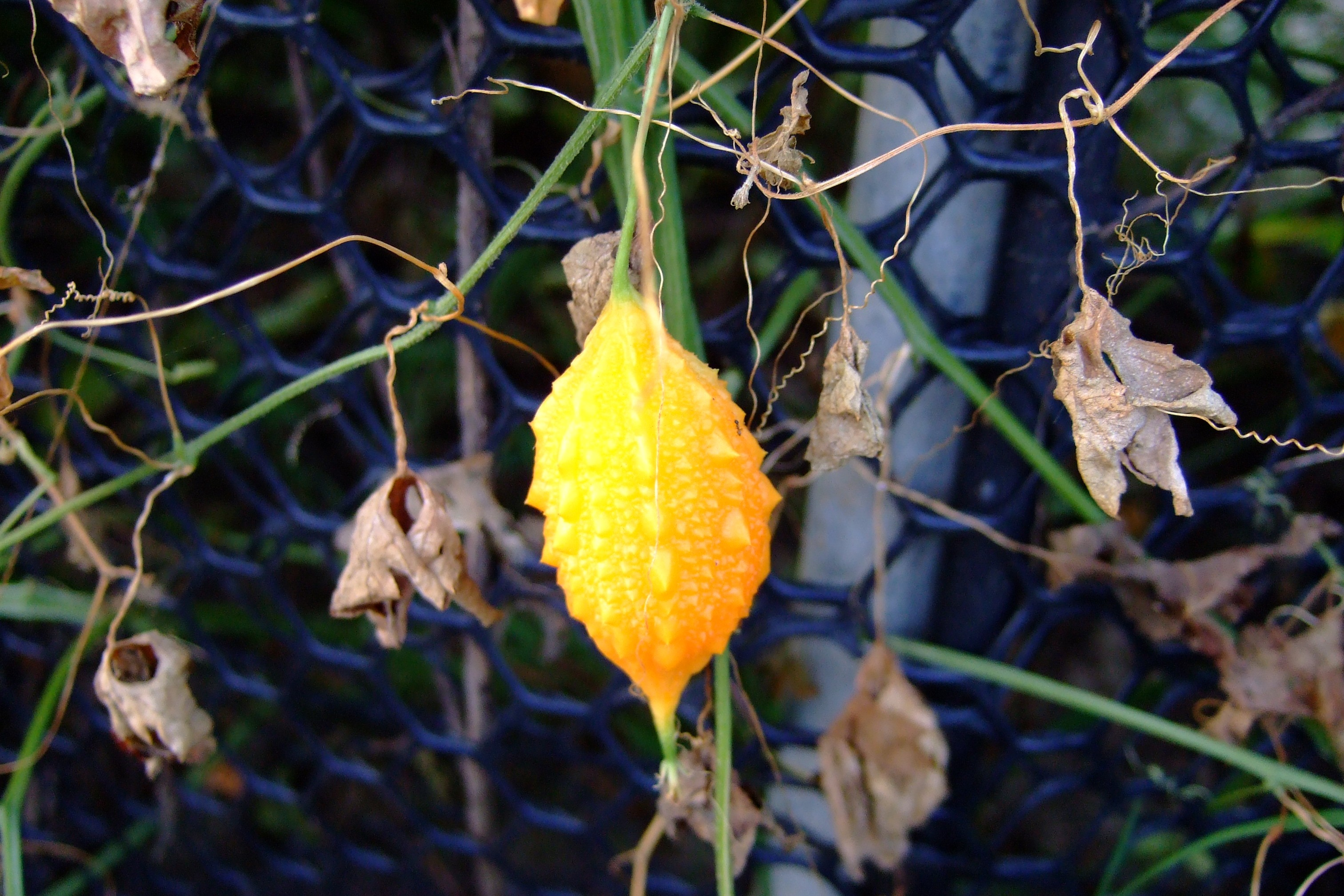 Small bitter melon